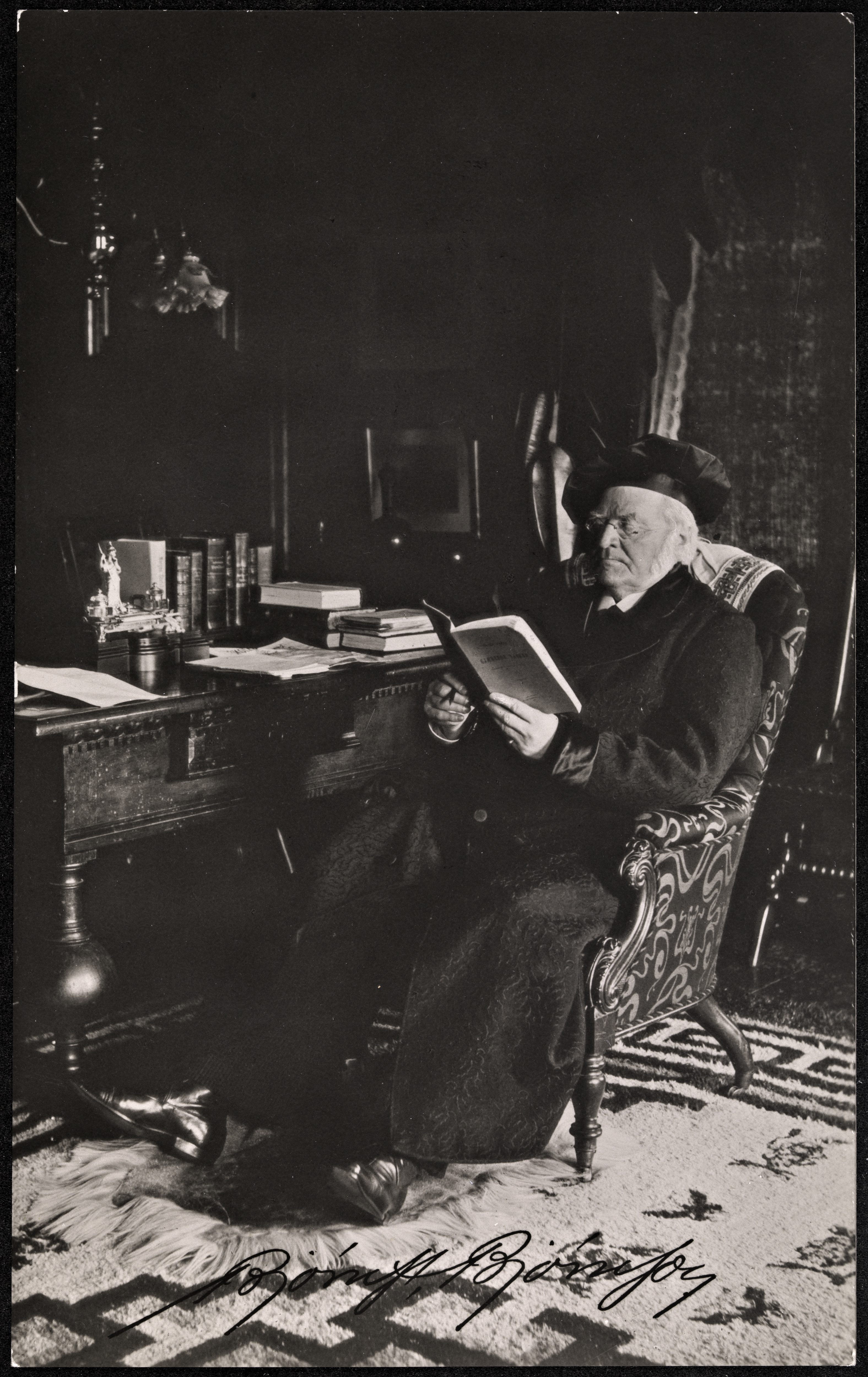 Tittel / Title: Bjørnstjerne Bjørnson leser på kontoret Beskrivelse / Description: Postkort / Postcard. Dato / Date: ca 1902 Fotograf / Photographer: Karl Anderson (1867-1913) Utgiver / Publisher: Mittet & Co. Eier / Owner Institution: Nasjonalbiblioteket / National Library of Norway Lenke / Link: Bildesignatur / Image Number: bldsa_BB0340